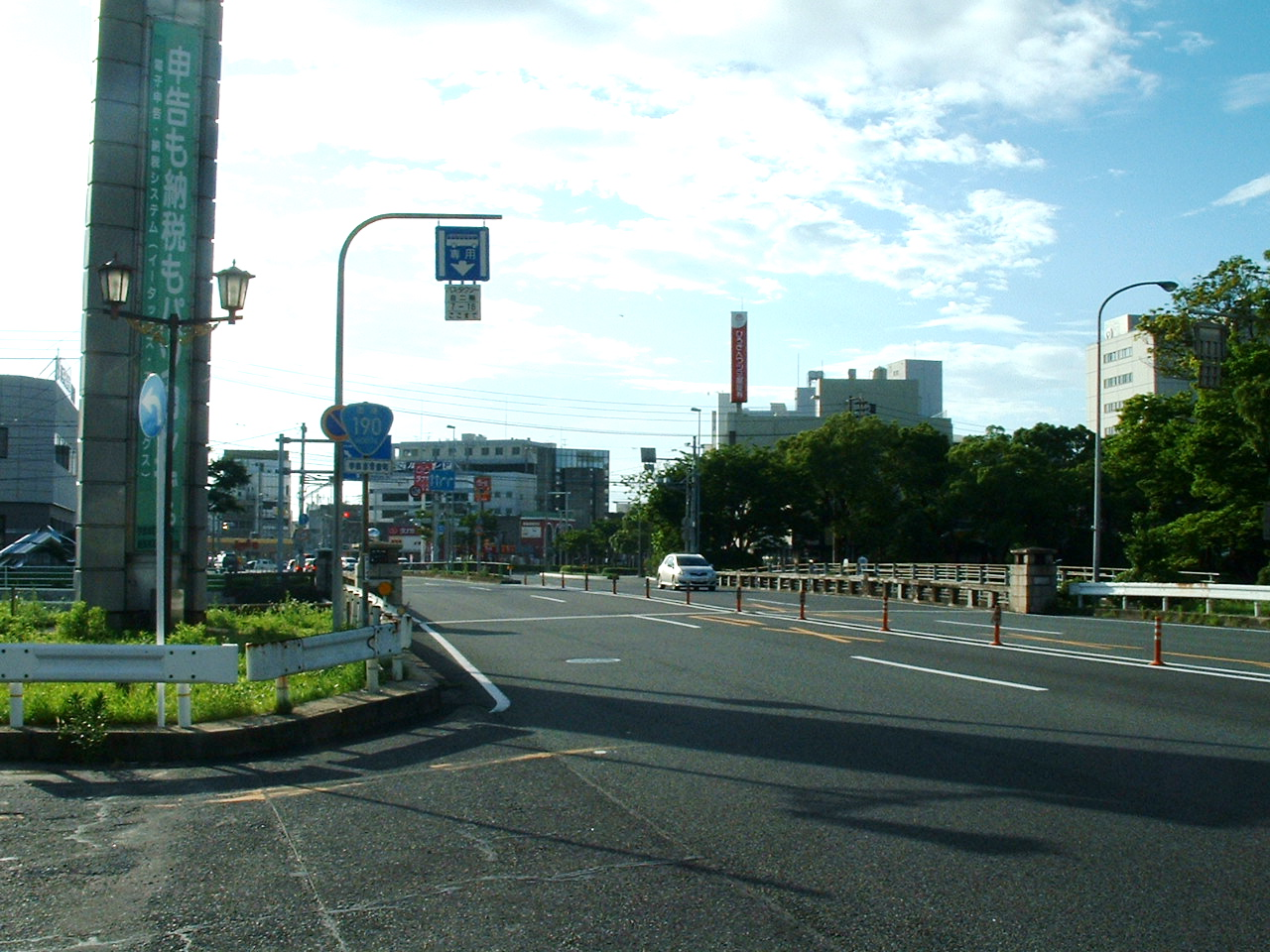 国道190号の新川大橋。2010年7月18日撮影。